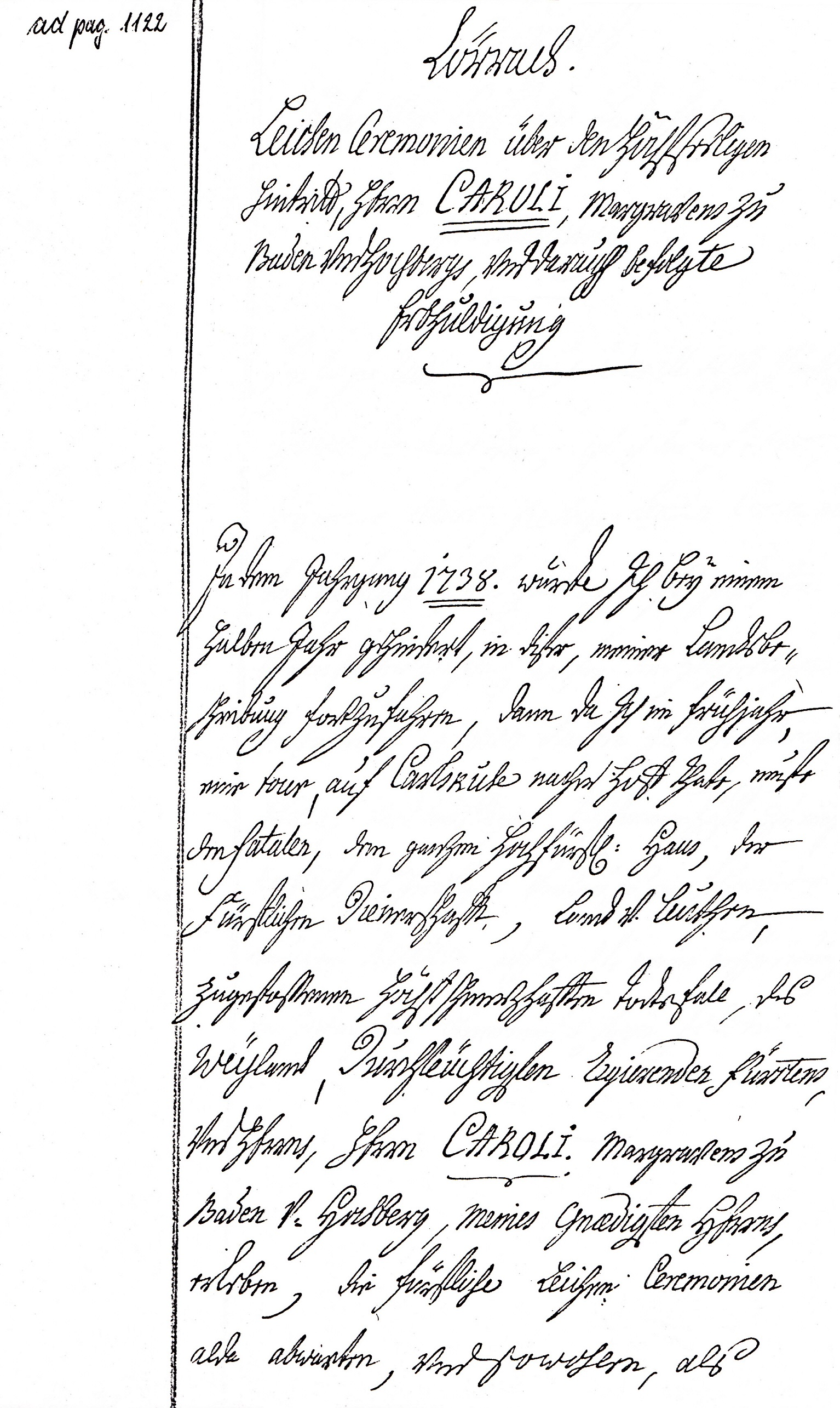 Seite aus der Beschreibung von Lörrach in der Leutrumschen Handschrift. nachbearbeiteter Scan einer Kopie aus dem Archiv des Röttelnbundes Lörrach